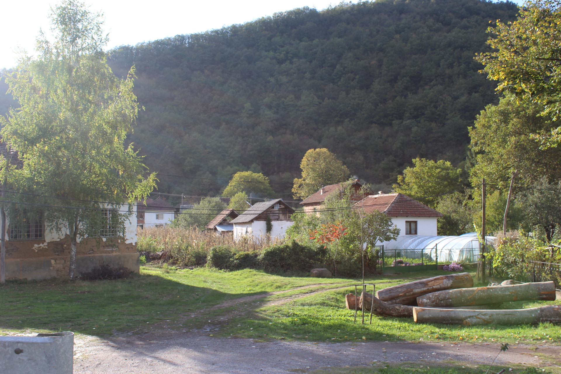 Srpski (latinica): Selo Maćedonce